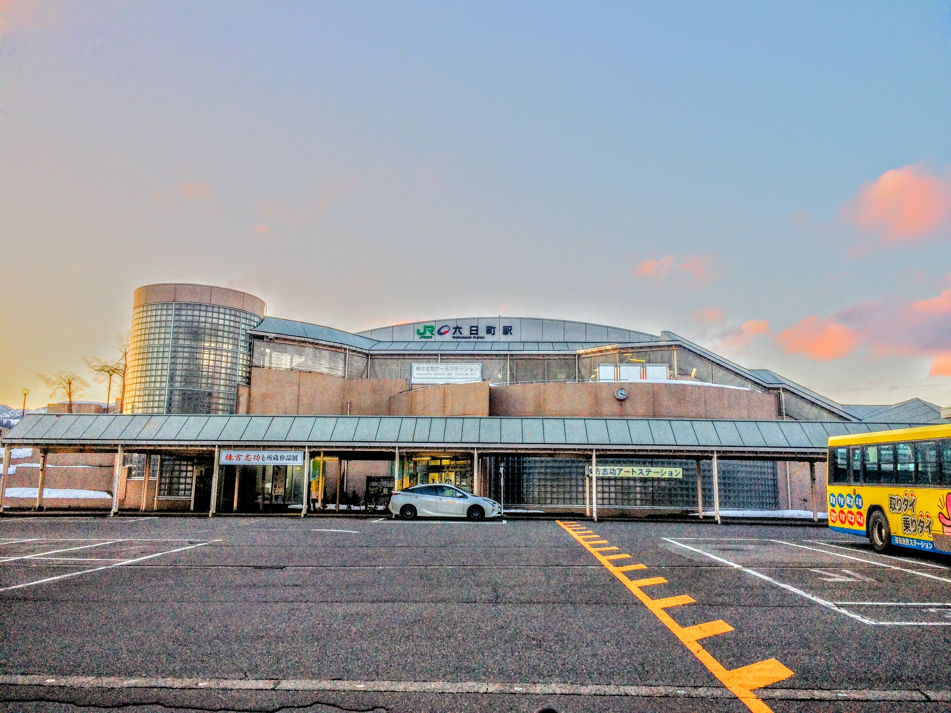 JR六日町駅